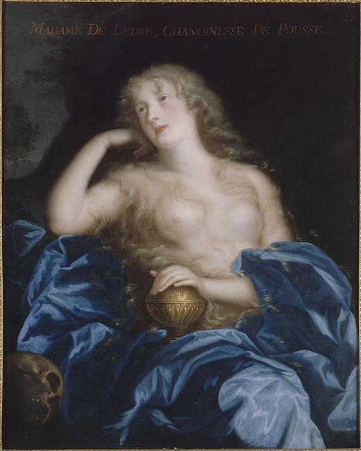 Madame Marie-Elisabeth de Ludres, Chanoinesse de Poussay , maîtresse de Louis XIV de France, représentée en Marie-Madeleine